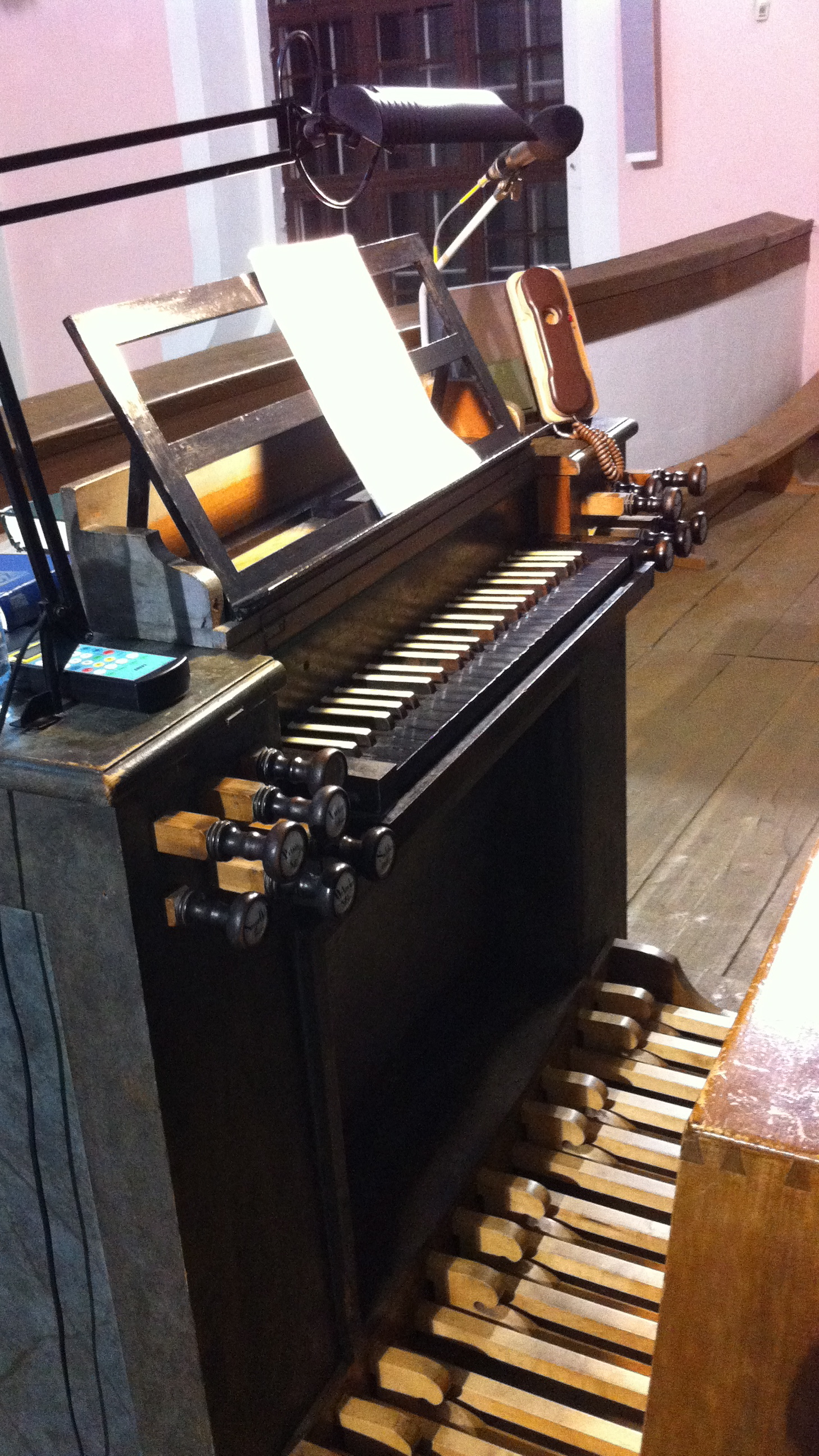 Kirche Srbska Kamenice Hauptorgel Spieltisch